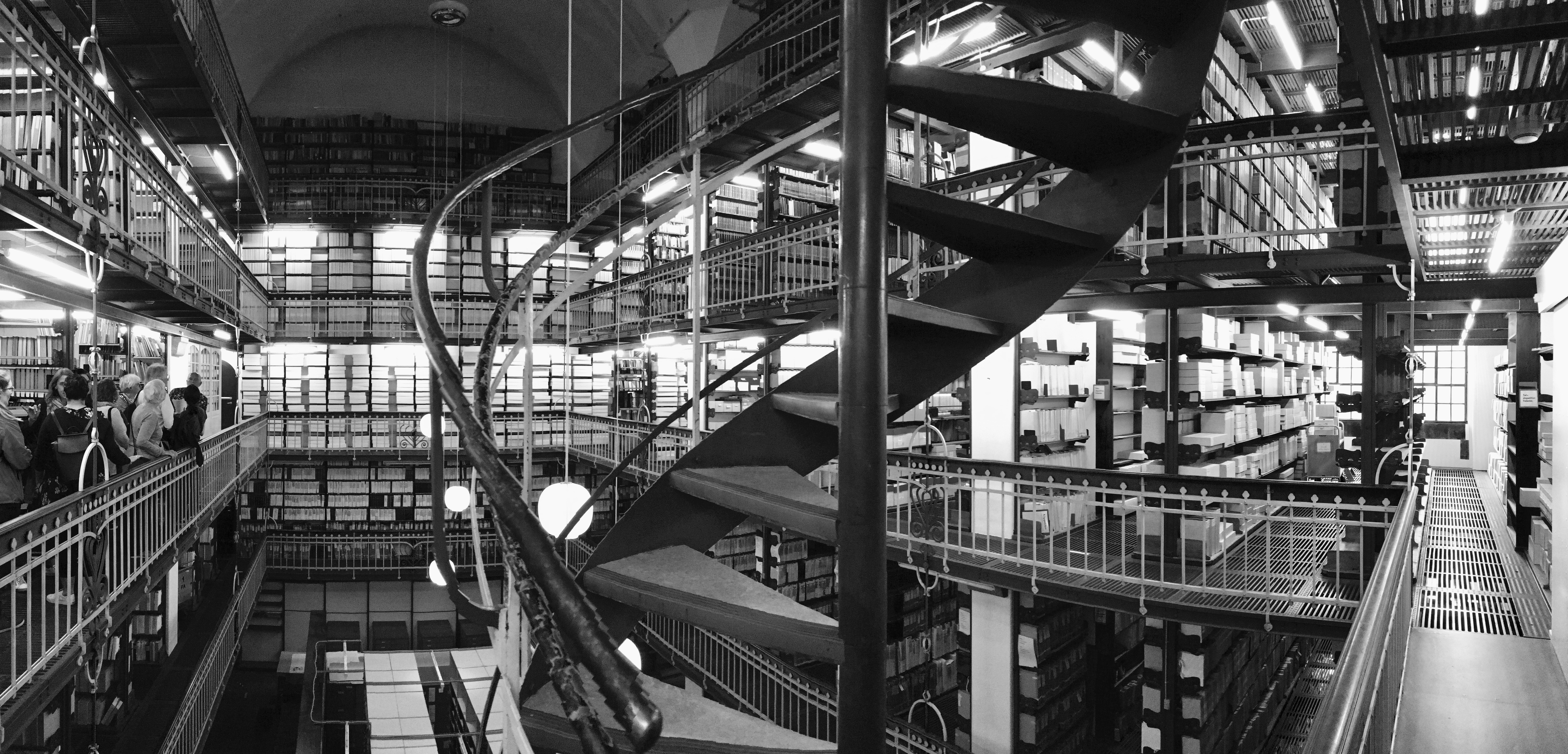 Réserve de la Bibliothèque royale (Copenhague, Danemark)